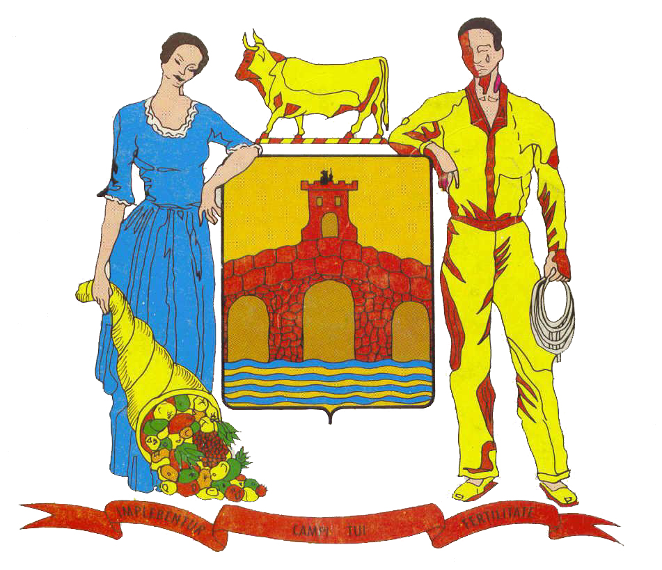 Escudo del Municipio Alberto Adriani